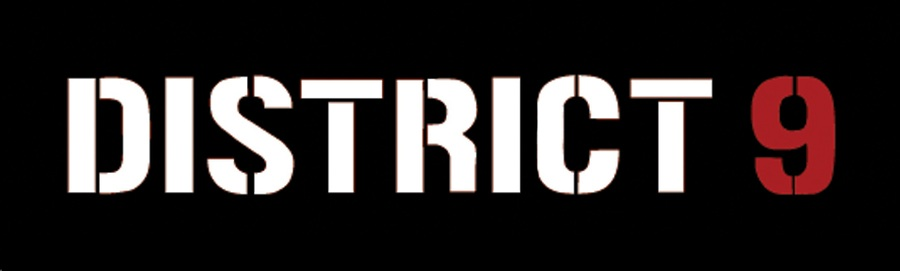 Logo de la película District 9 (Distrito 9)